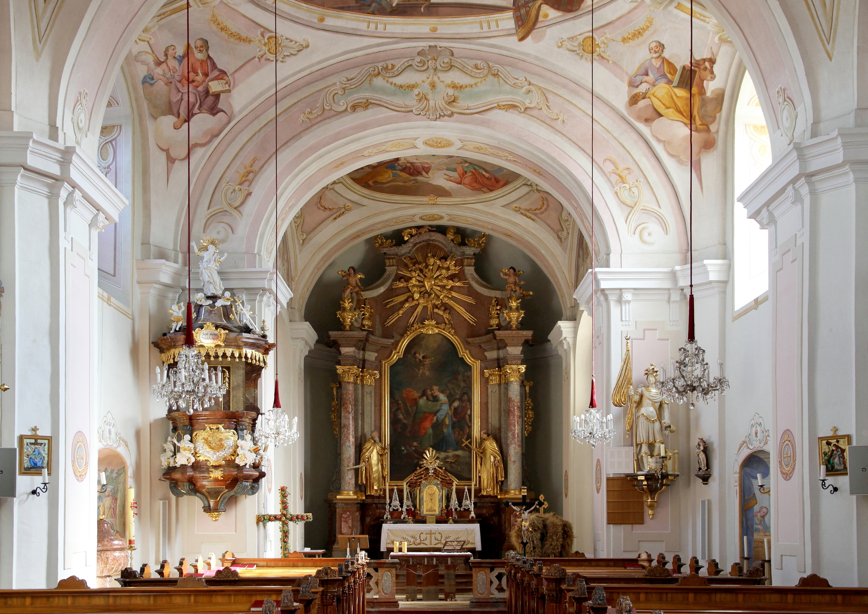 Innenansicht der katholischen Pfarrkirche hl. Petrus und Paulus in der niederösterreichischen Marktgemeinde Michelhausen. Das Hochaltarbild sowie die einheitlich durchgestaltete illusionistische Wand- und Deckenmalerei stammen von Josef Adam Mölk.